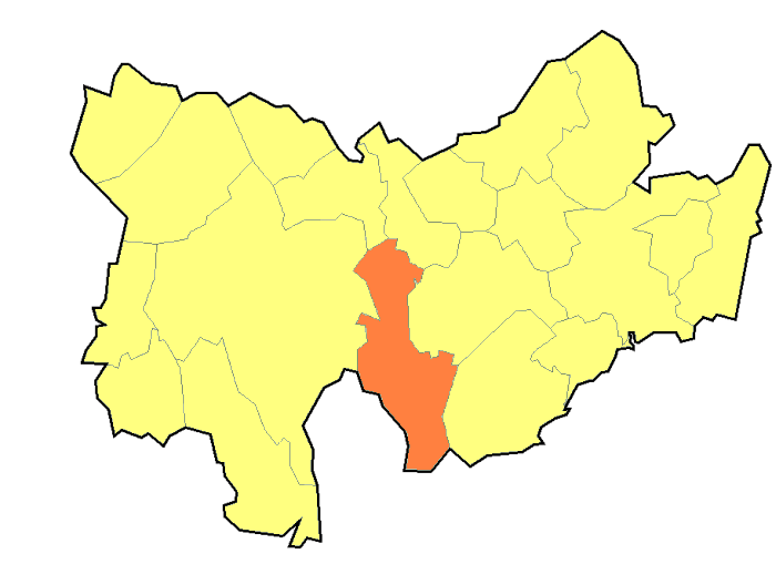 Hranice Nevojice (Vyškov-(Bučovice)- czech republic)